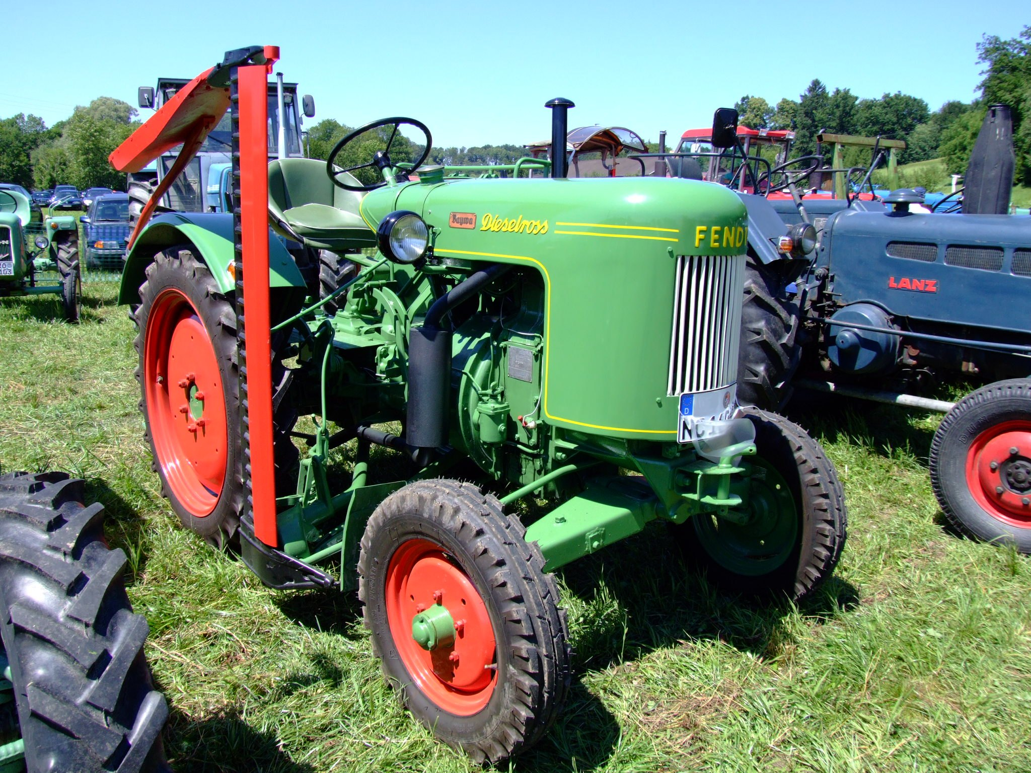 Fendt Dieselross F20G mit 20 PS, Baujahr 1952